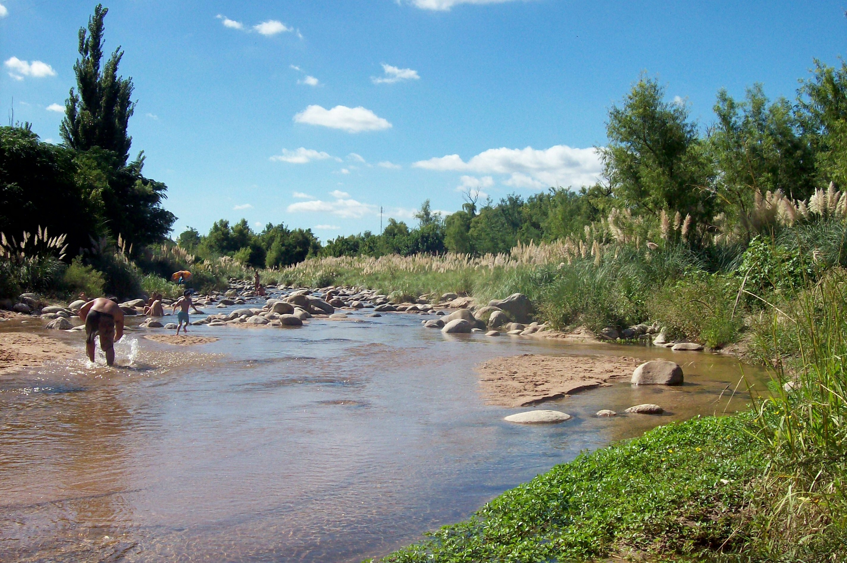 Río chico de Nono, a pocos metros de la ciudad de Nono, provincia de Córdoba, Argentina.